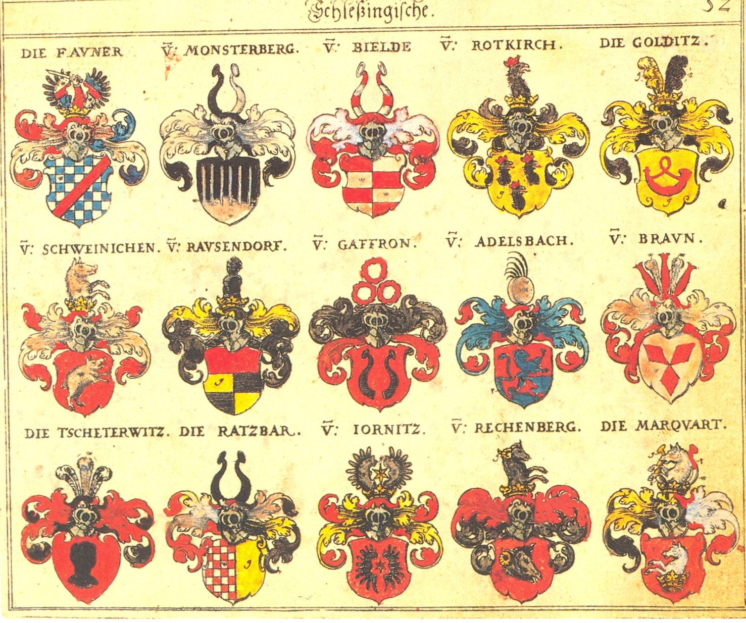 Johann Siebmacher: New Wappenbuch eingescannt aus: Horst Appuhn (Hrsg.), Johann Siebmachers Wappenbuch. Die bibliophilen Taschenbücher 538, 2. verb. Aufl , Dortmund 1989 Schlesische Blatt 52